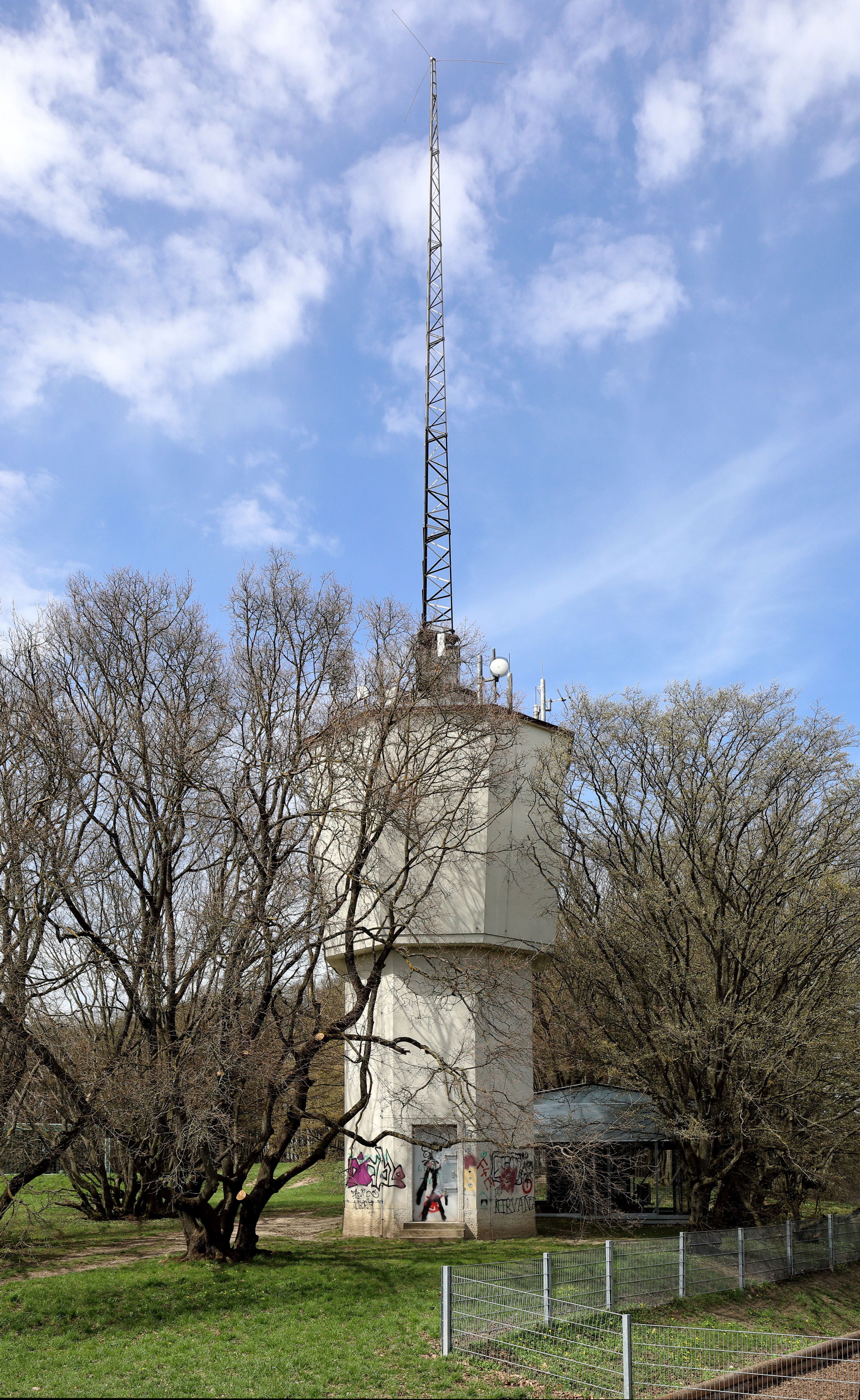 Der Wasser-, Funk- und Sendeturm Wolfersberg auf dem 322 Meter hohen Wolfersberg im 14. Wiener Gemeindebezirk PenzingDer Wasserturm mit rd. 12 m Höhe wurde 1950 errichtet und hat ein Behältervolumen von 63,2 m³. Auf ihm befinden sich eine Antennenanlage des Flugfunkfeuers für die in Schwechat landenden Flugzeuge sowie UKW-Sendeantennen.